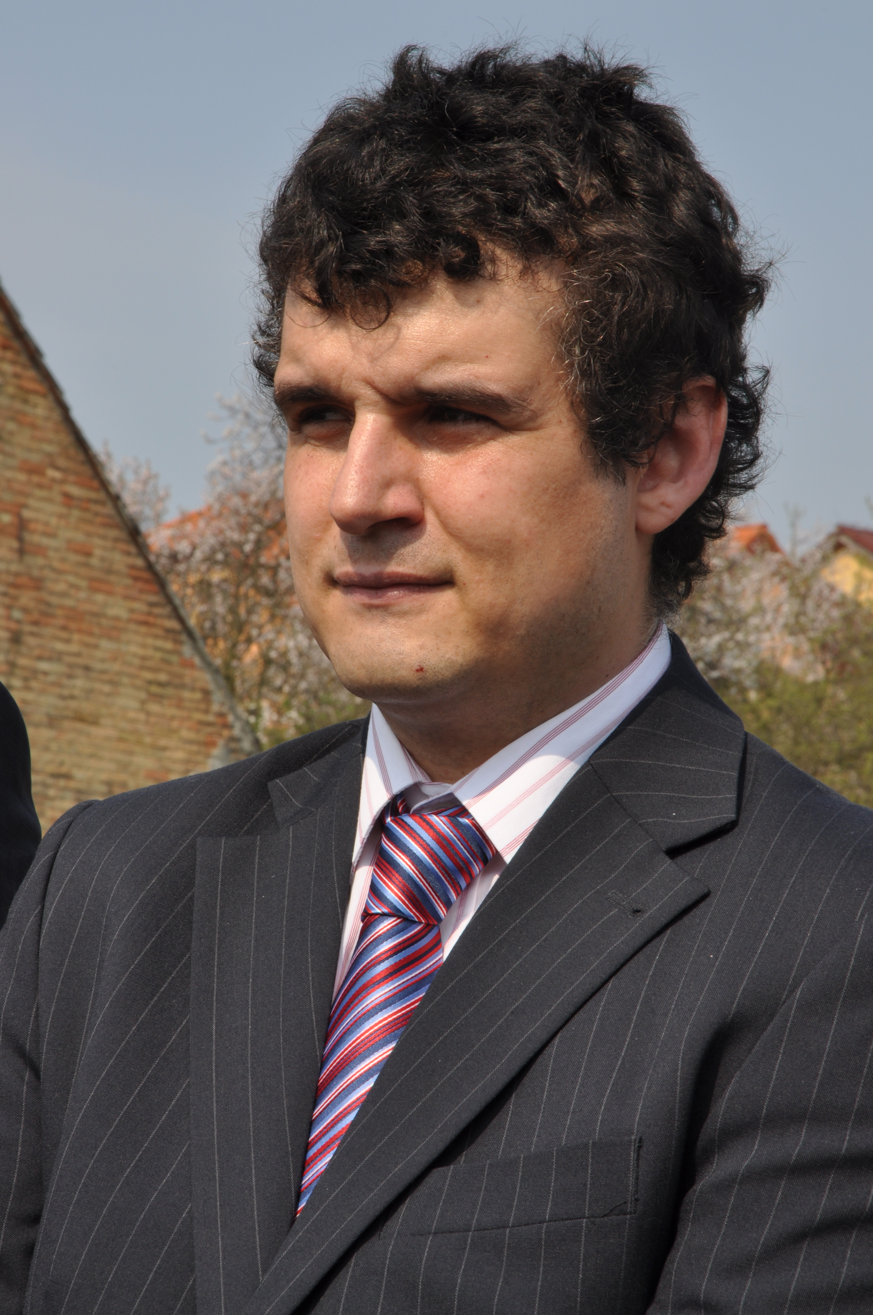 Jan Soběslavský, ředitel brněnského střediska Diakonie